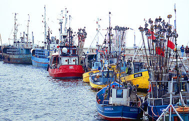 Kaszëbsczi: Hél - rëbackô hôwinga